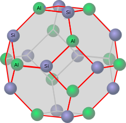 Sodalit-Käfig